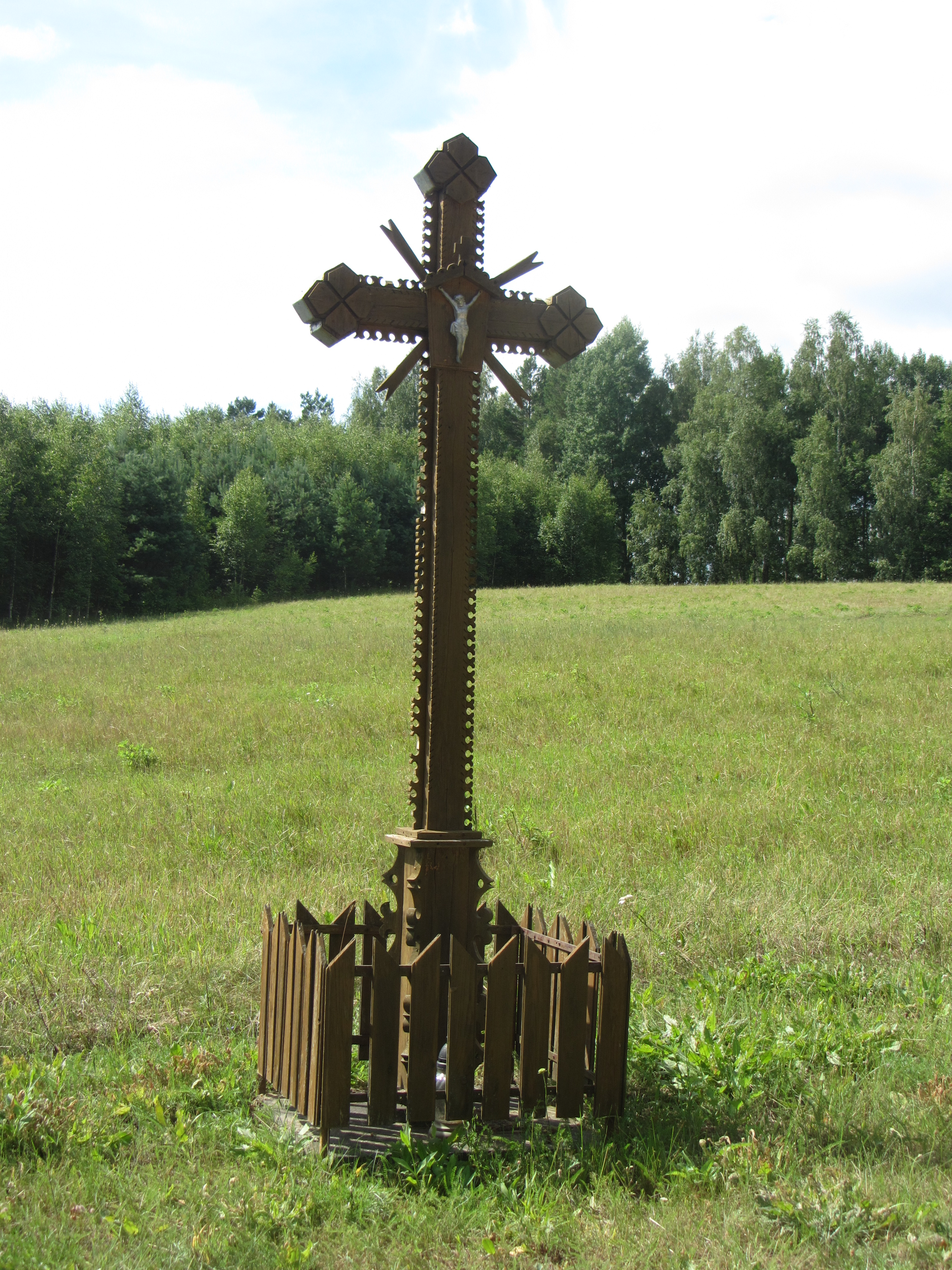 Mindūnų sen., Lithuania